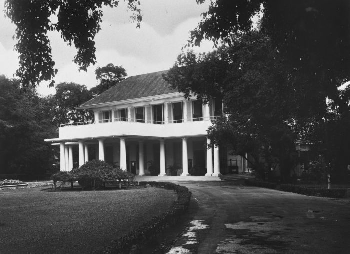 Foto. Soerabaja, de woning van de gouverneur